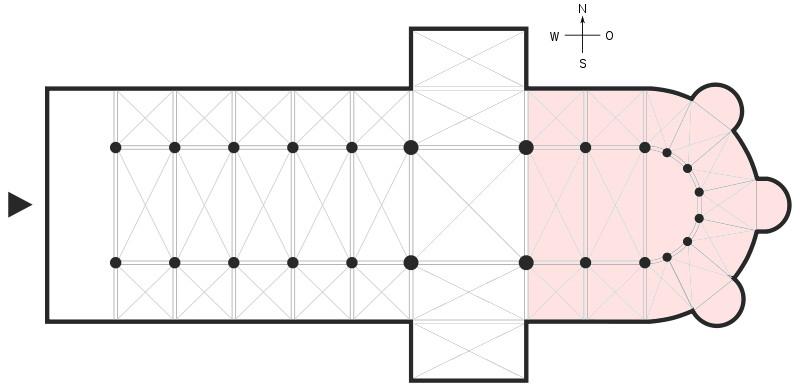 Prolongement de la nef